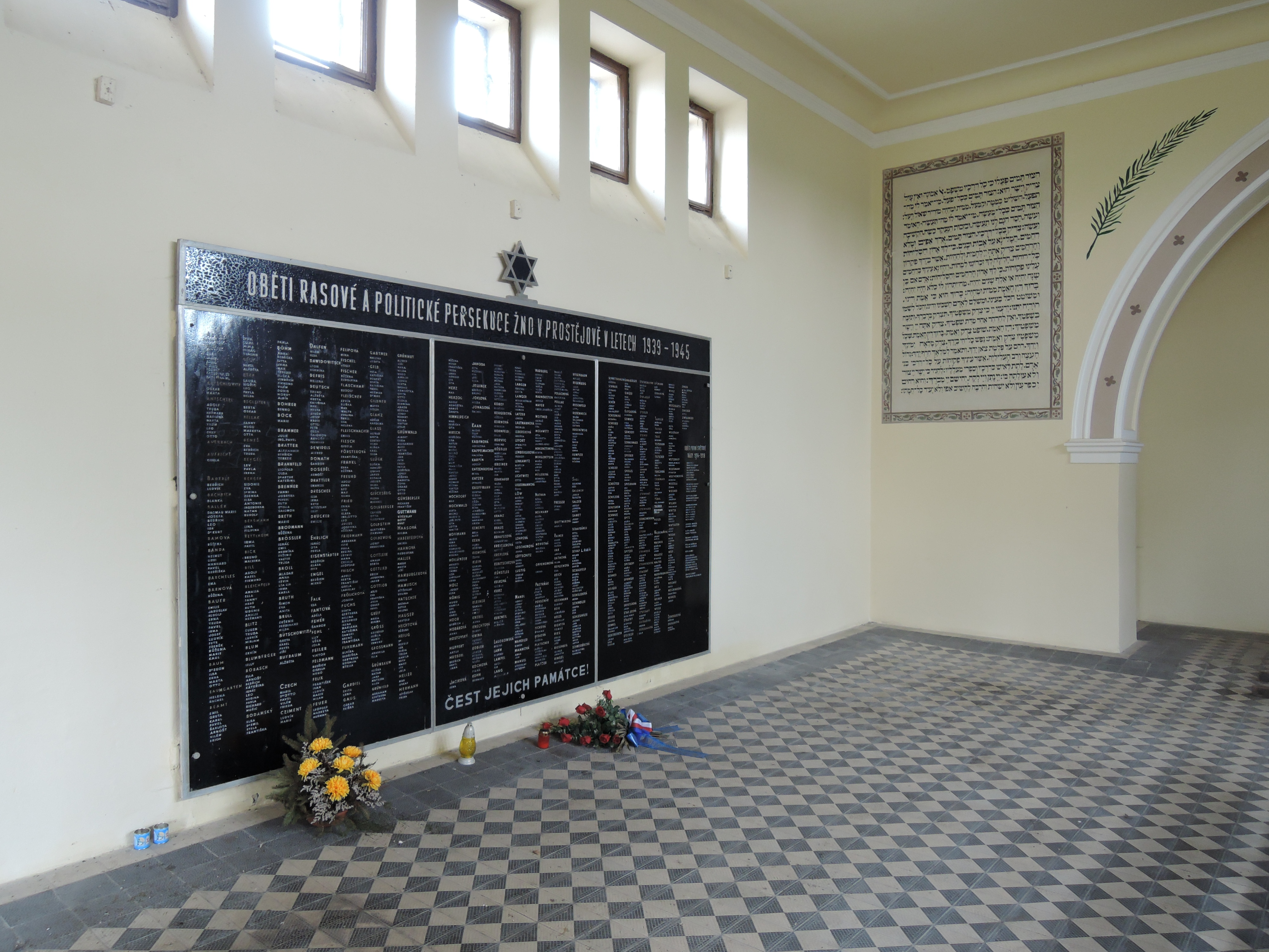 Prostějov, nový židovský hřbitov, ceremoniální síň